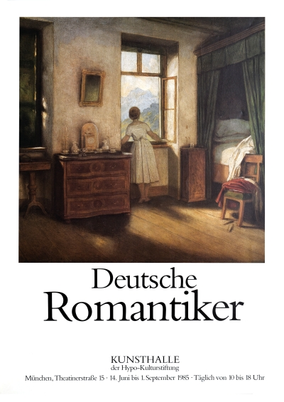 Ausstellungsplakat Deutsche Romantiker (c) Kunsthalle der Hypo-Kulturstiftung